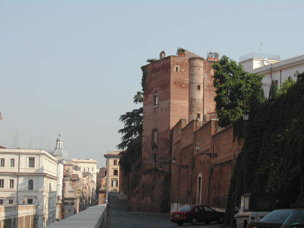 Roma, Torre degli Annibaldi (Monti)